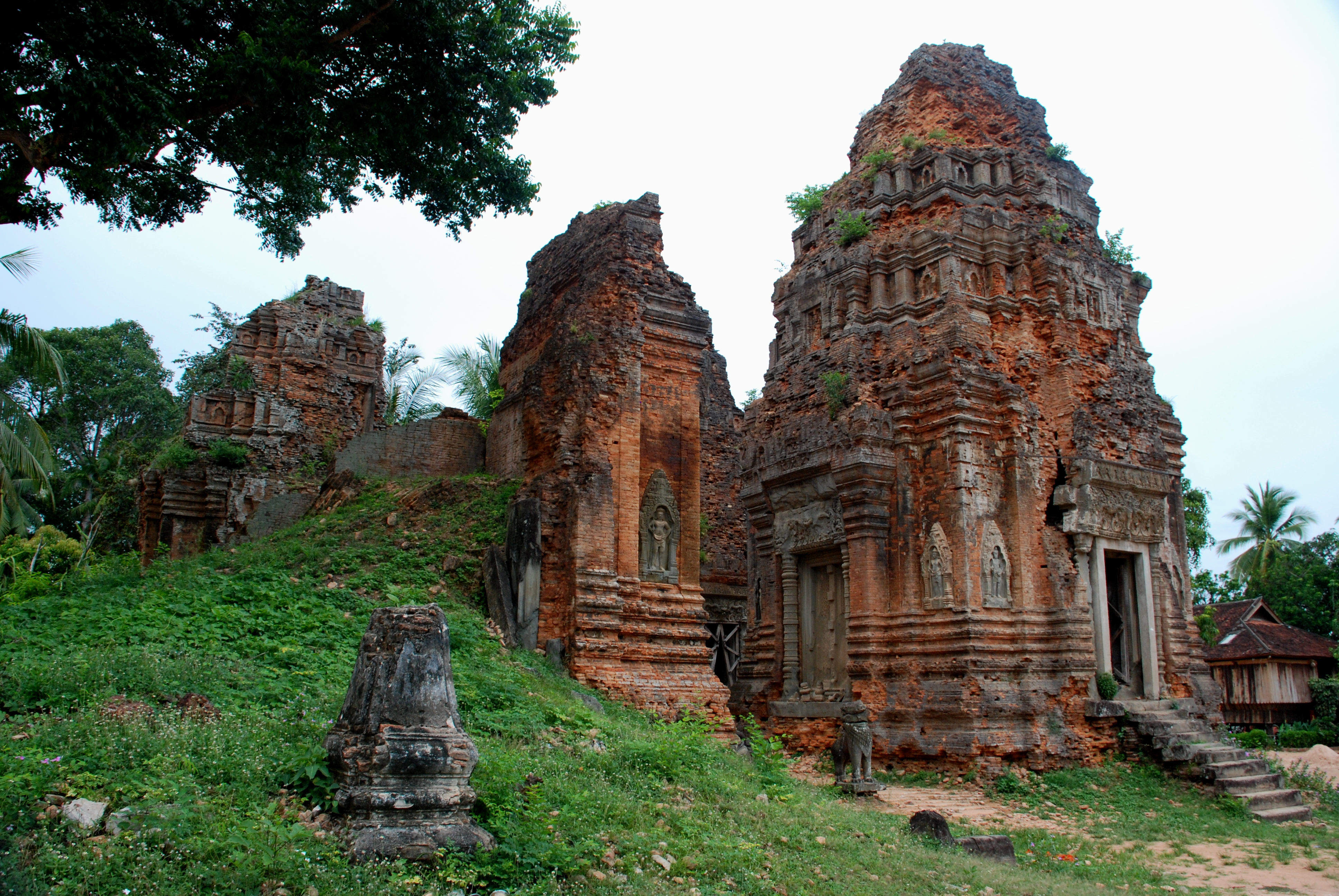 Roluos